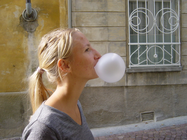 Bubble gum